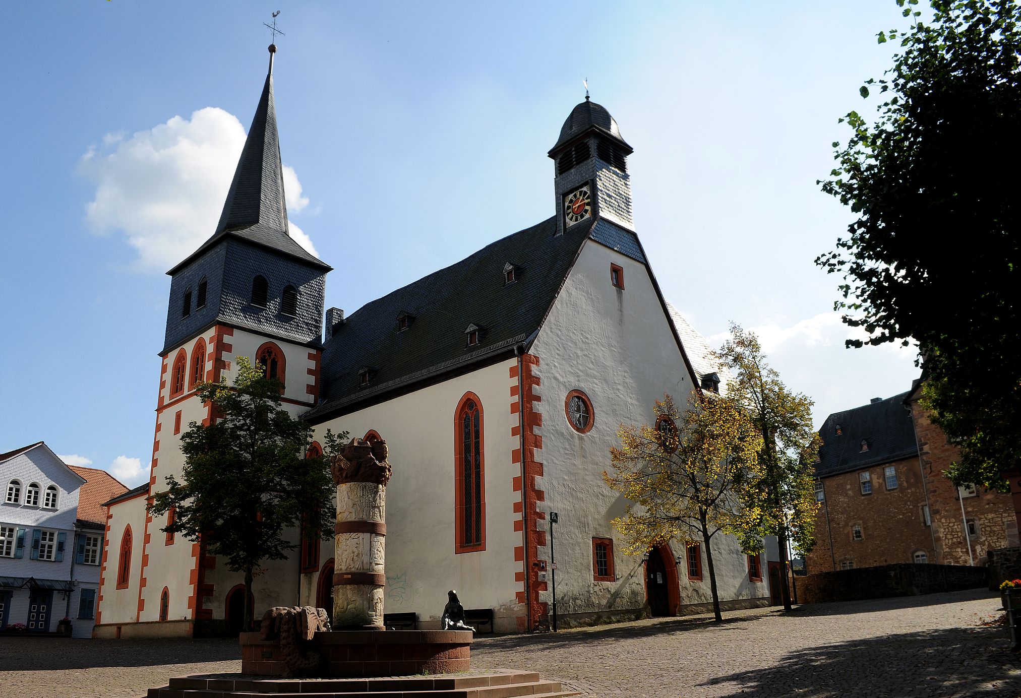 Katharinenkirche – Die Aufnahme wurde von der Brüder Grimm-Straße - 36396 Steinau an der Straße aus gemacht.